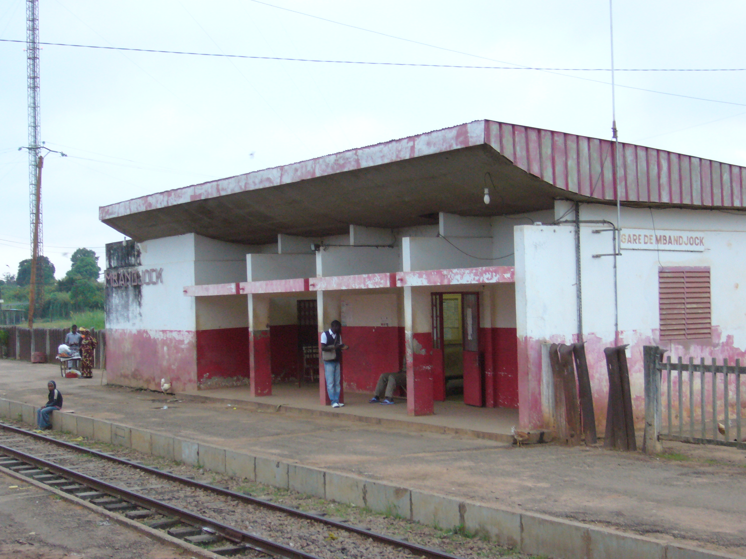 Cameroun - Gare de Mband Jock, sur l'unique ligne de train Camerounais : Douala - Yaoundé - Ngaoundéré This is an image with the theme "Africa on the Move or Transport" from: Cameroon